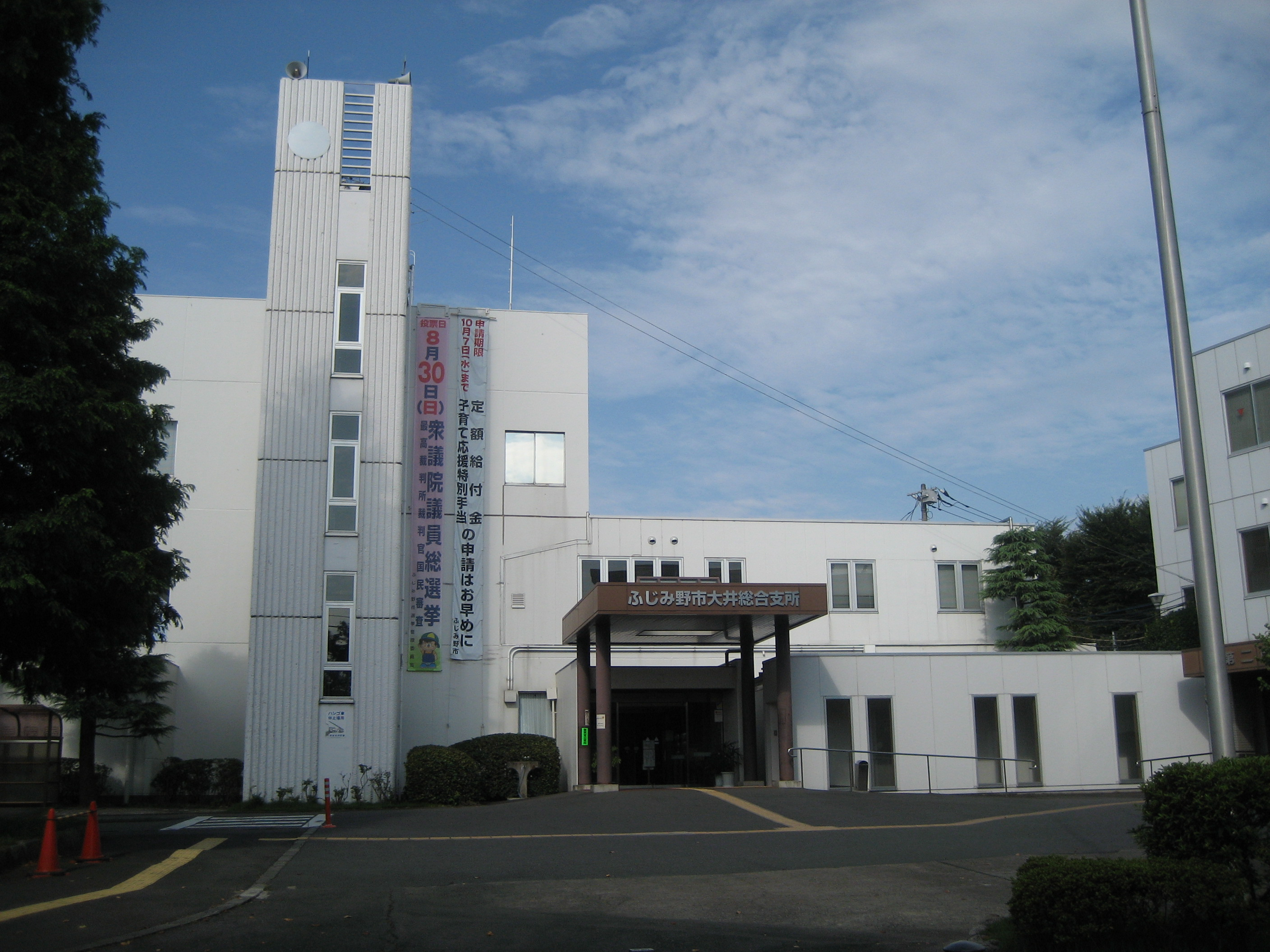 埼玉県ふじみの市役所大井総合支所庁舎（旧入間郡大井町役場）